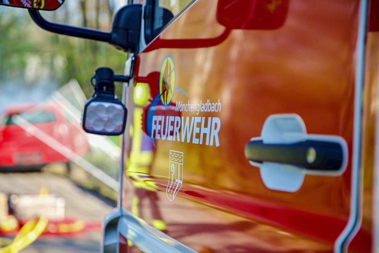 Logo Tür #FWMG (hell)